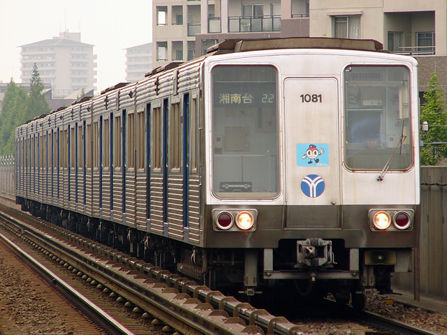 横浜市交通局1000形、仲町台駅にて。